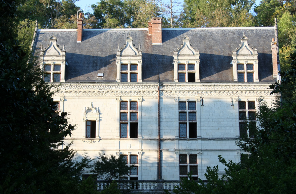 PA00097505 Château Gaillard